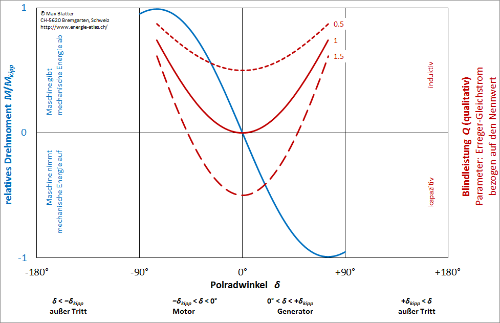 Typische Drehmoment-Drehzahl-Kennlinie einer Synchronmaschine